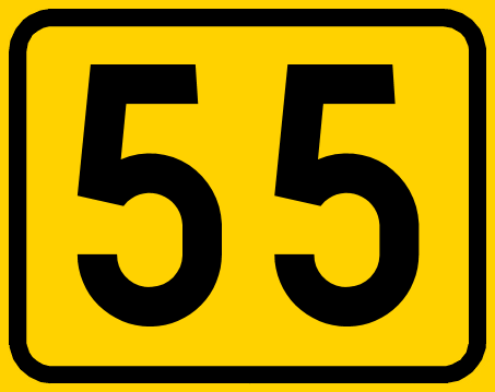 Liikennemerkki 665. Kantatien numero (55)